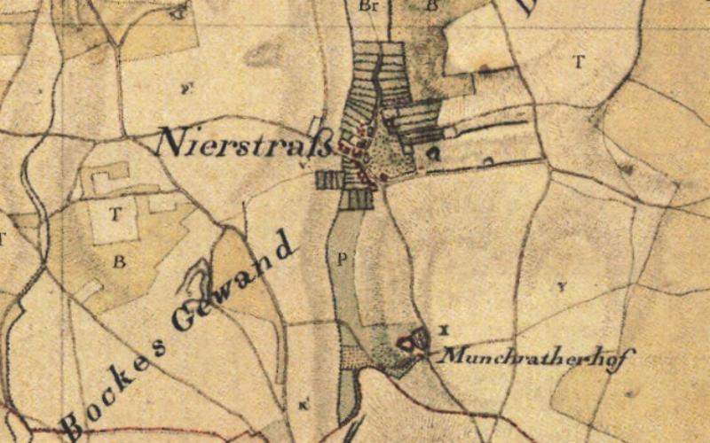 Kartenaufnahme der Rheinlande 1803-1820